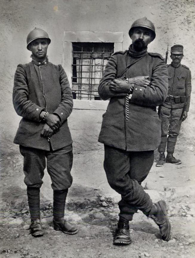 Fabio Filzi e Cesare Battisti prigionieri in Aldeno. Foto originale di Sergio Perdomi (1887 - 1935)